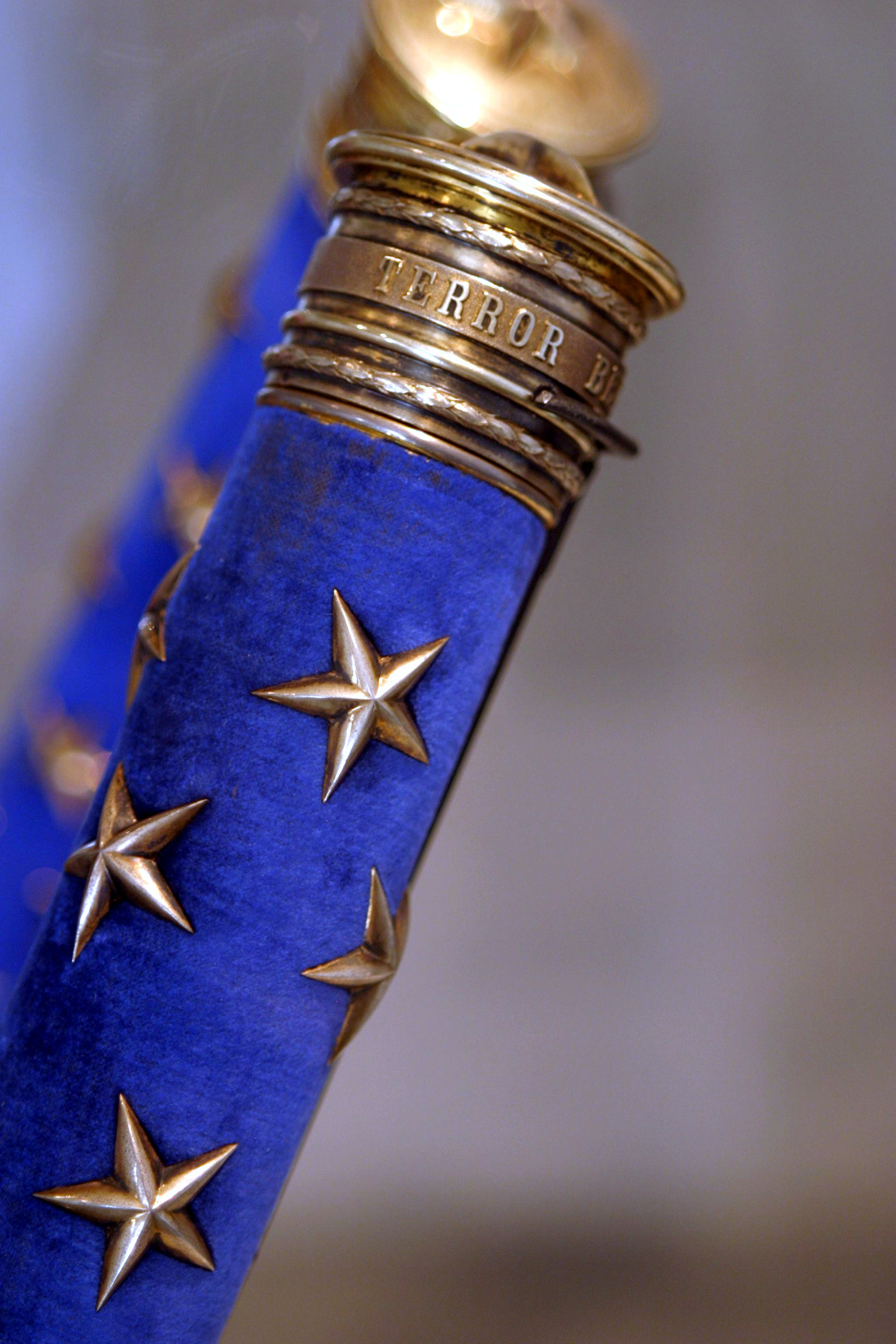 Baton of a modern Marshal of France. This image was taken at the Musée de l'Armée, Paris.